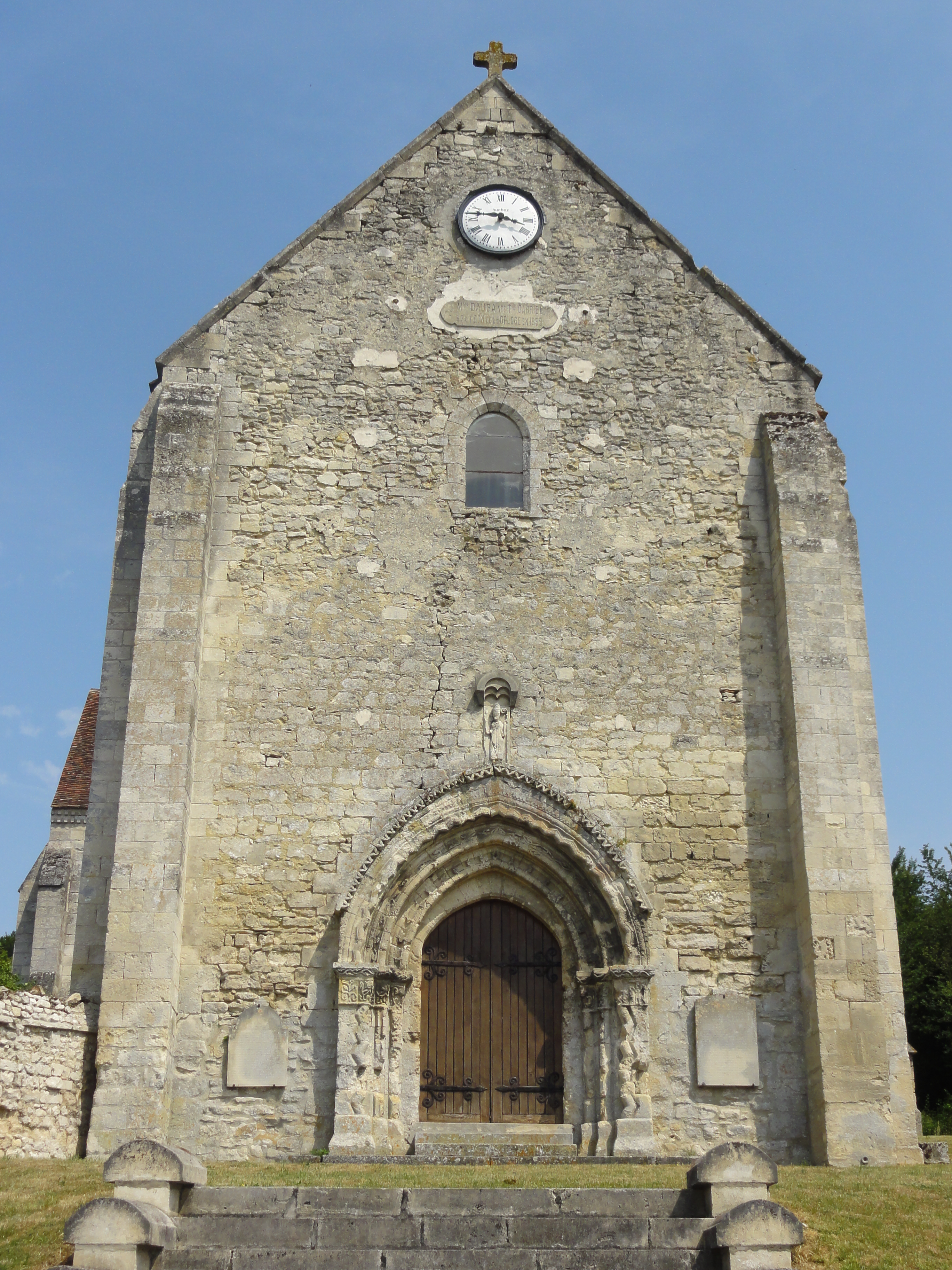 Église Saint-Lucien d'Ansacq (voir titre).